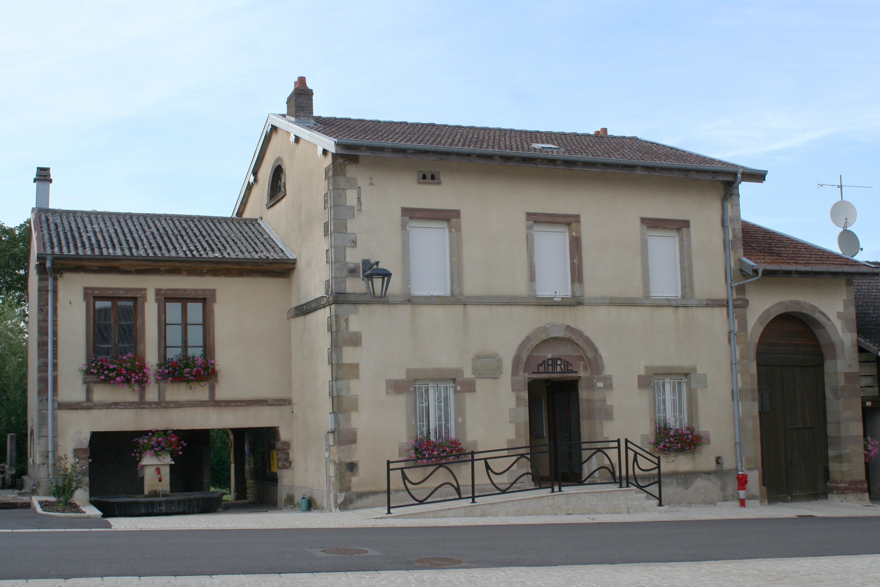 Mairie de Saint-Genest (Vosges)